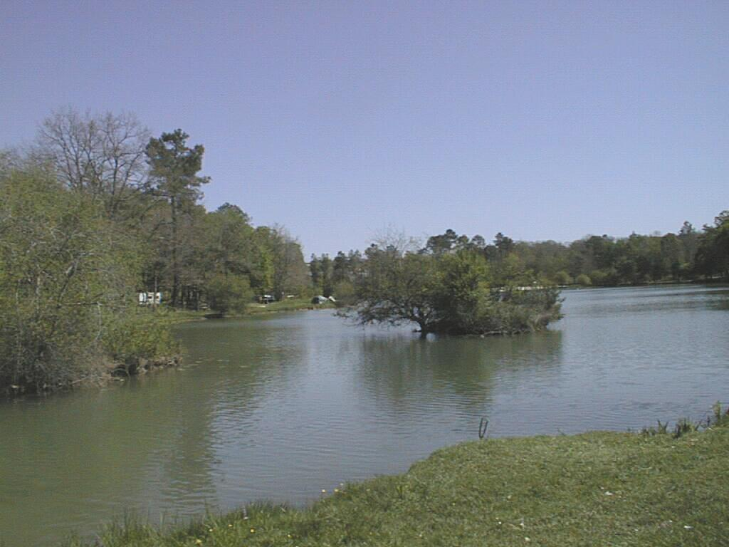 Lac de Neuf-Font, Saint-Amand-de-Vergt, Dordogne, France.